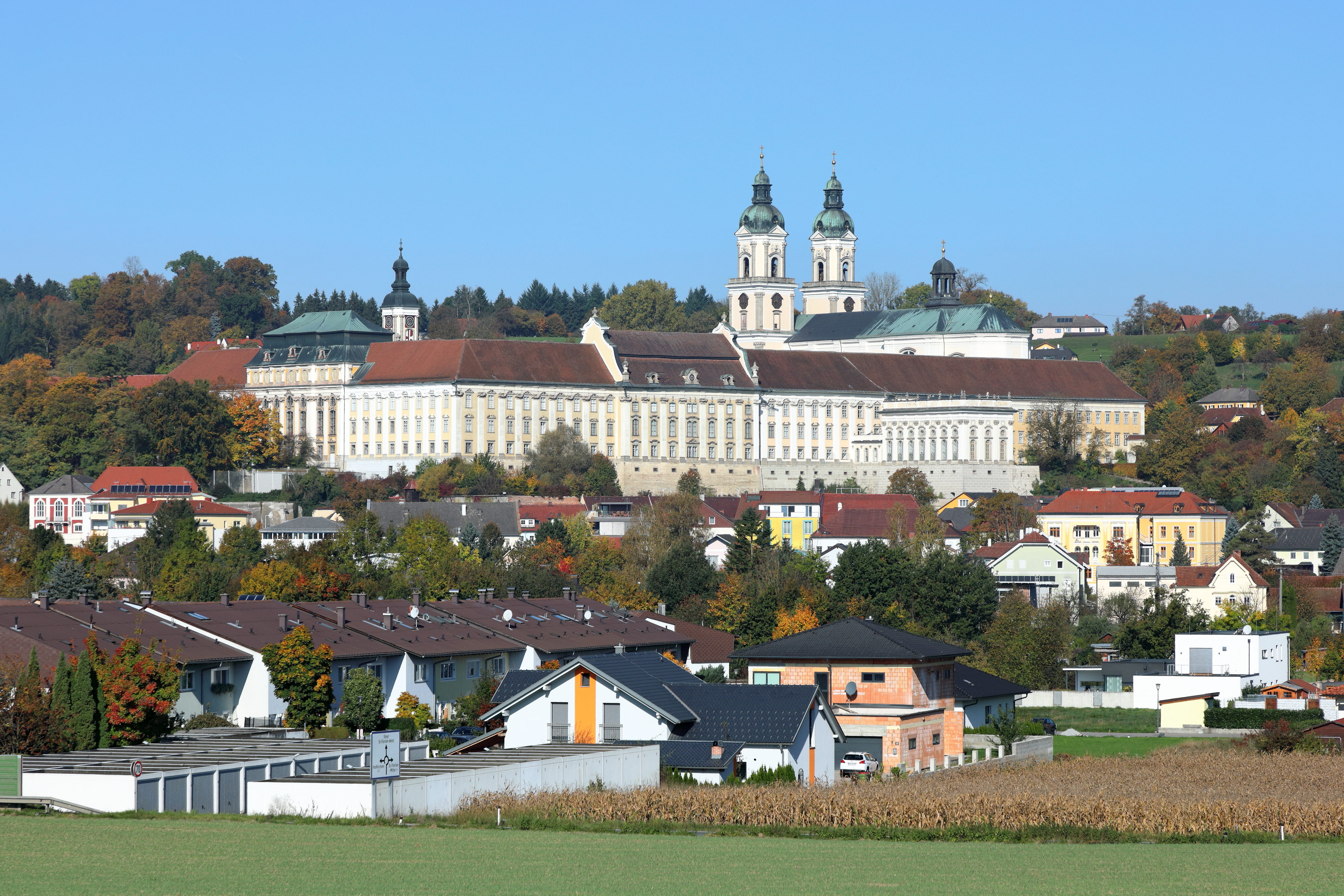 Südostansicht des Stiftes Sankt Florian in der oberösterreichischen Marktgemeinde St. Florian bei Linz. Wann das Kloster gegründet wurde ist unbekannt, jedoch erste schriftliche Zeugnisse einer Klosteranlage gehen auf karolingische Zeit zurück (um 800 n. Chr.). Von 1668 bis in die Mitte des 18. Jahrhunderts erfolgte eine weitgehende Neuerrichtung des Stiftes unter Einbeziehung älterer Bausubstanz. Der Neubau zählt zu den glänzendsten Leistungen des österr. Barockbaues, der vorwiegend von dem Baumeister Carlo Antonio Carlone realisiert wurde.